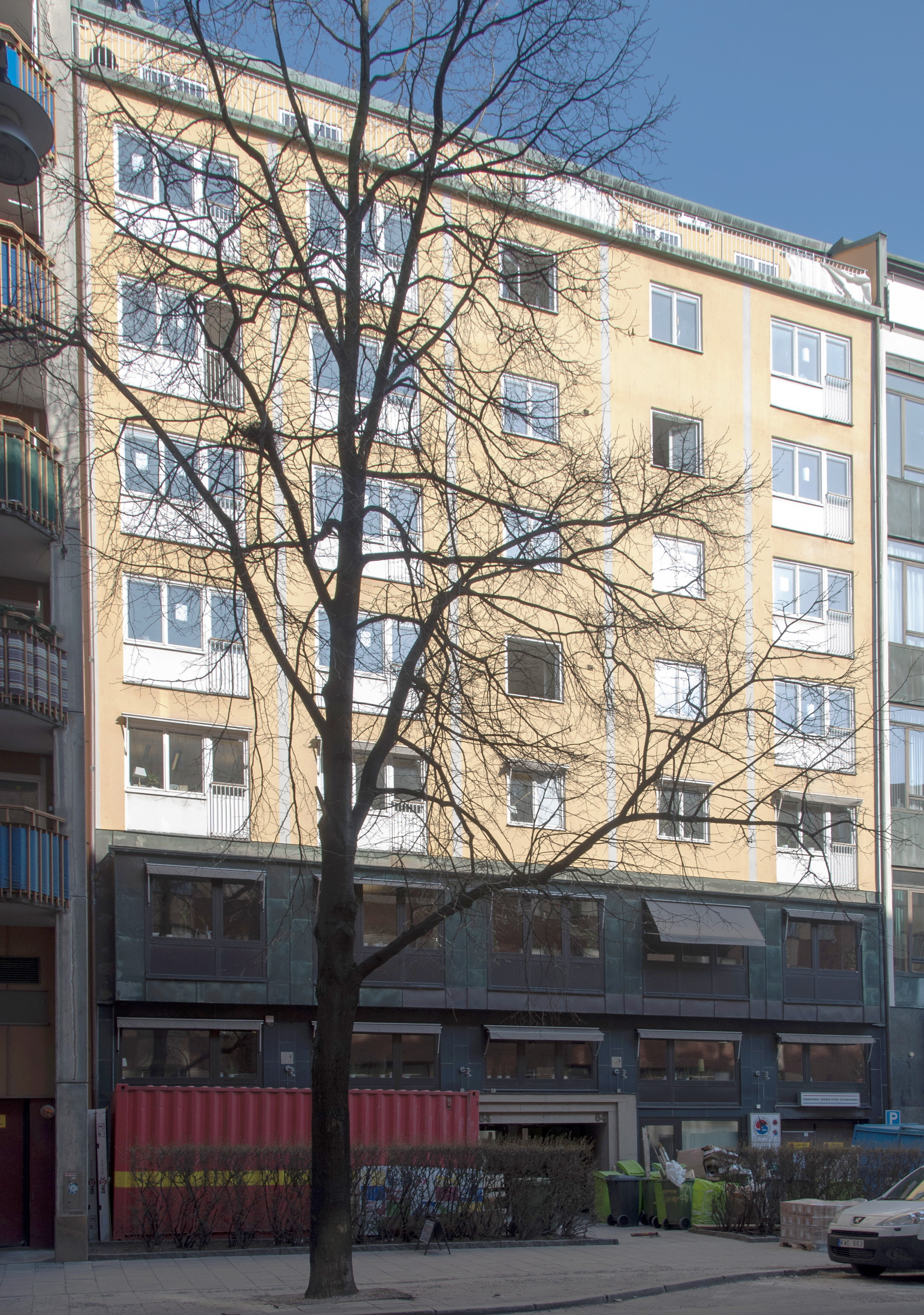 Geten 17,Döbelnsgatan 64, Nybyggnadsår 1955 - 1965, Hans Andersson (Byggherre) Karl G H Karlsson (Arkitekt) K. H. Karlsson Ingenjörsbyrå (Byggmästare)